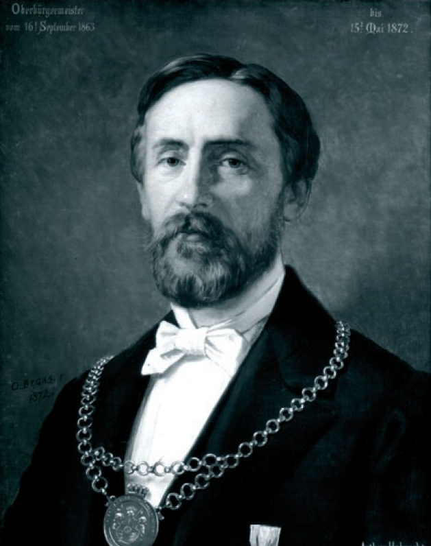 Arthur Hobrecht (1824–1912), Oberbürgermeister von Berlin